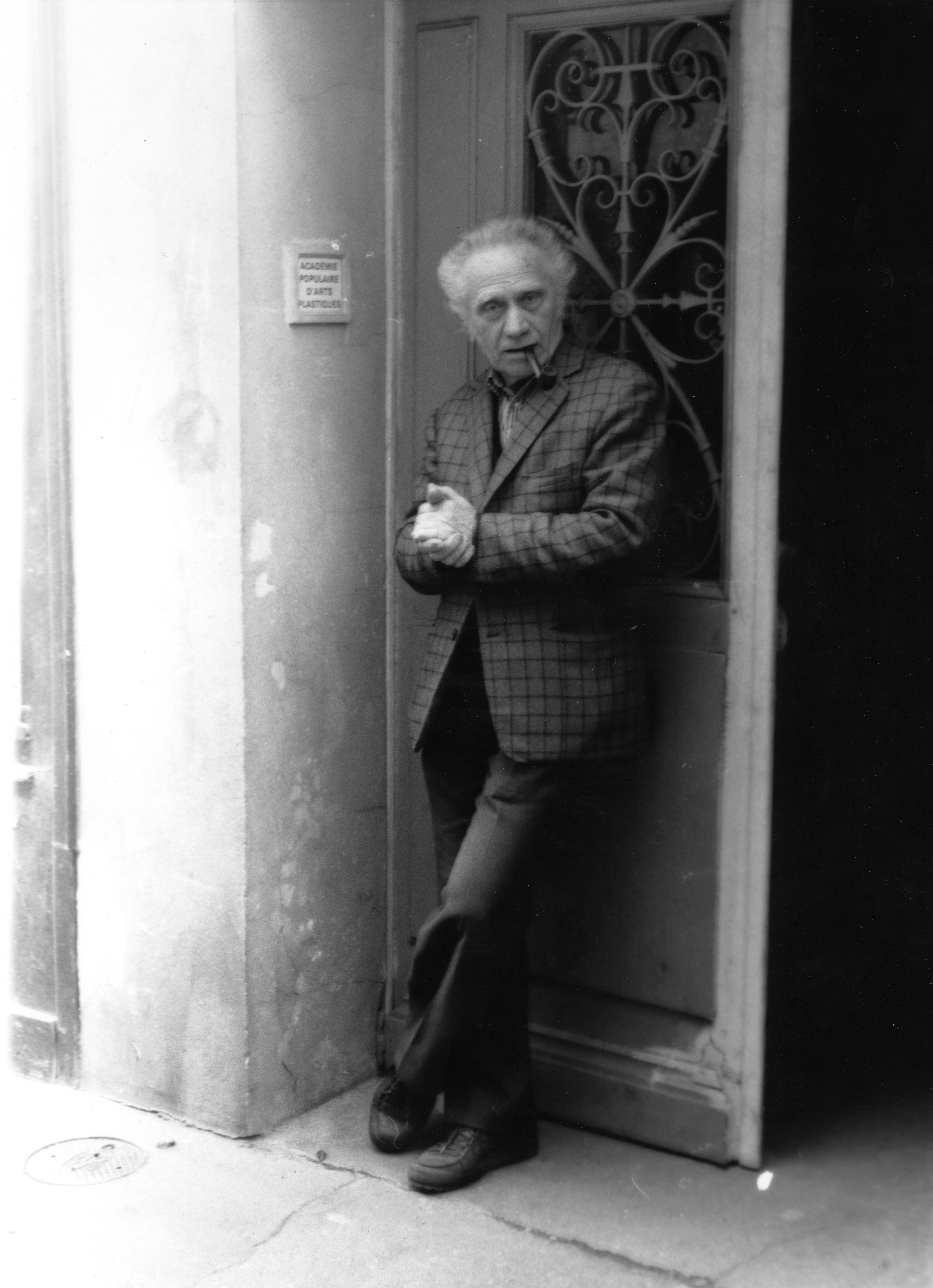 Lucien Lautrec devant l'entrée de son atelier, 10, rue Tournefort Paris 75005